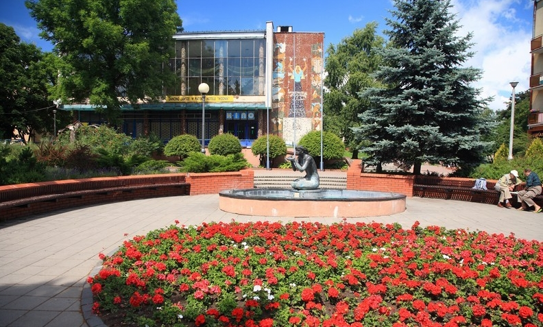 Giżycko - miasto w woj. warmińsko-mazurskim